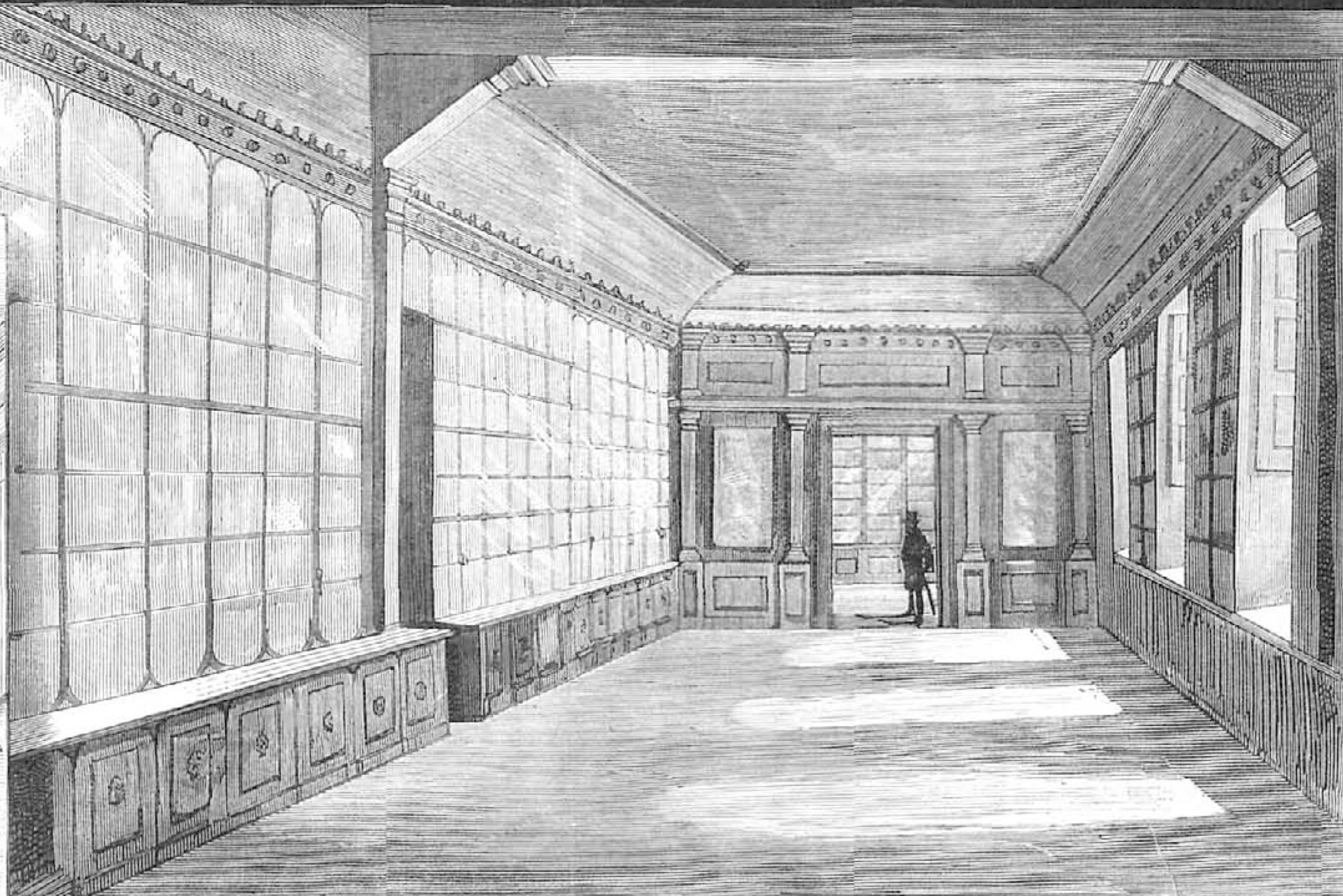 Madrid, Escuela-Modelo, inaugurada el 21 de septiembre de 1885.